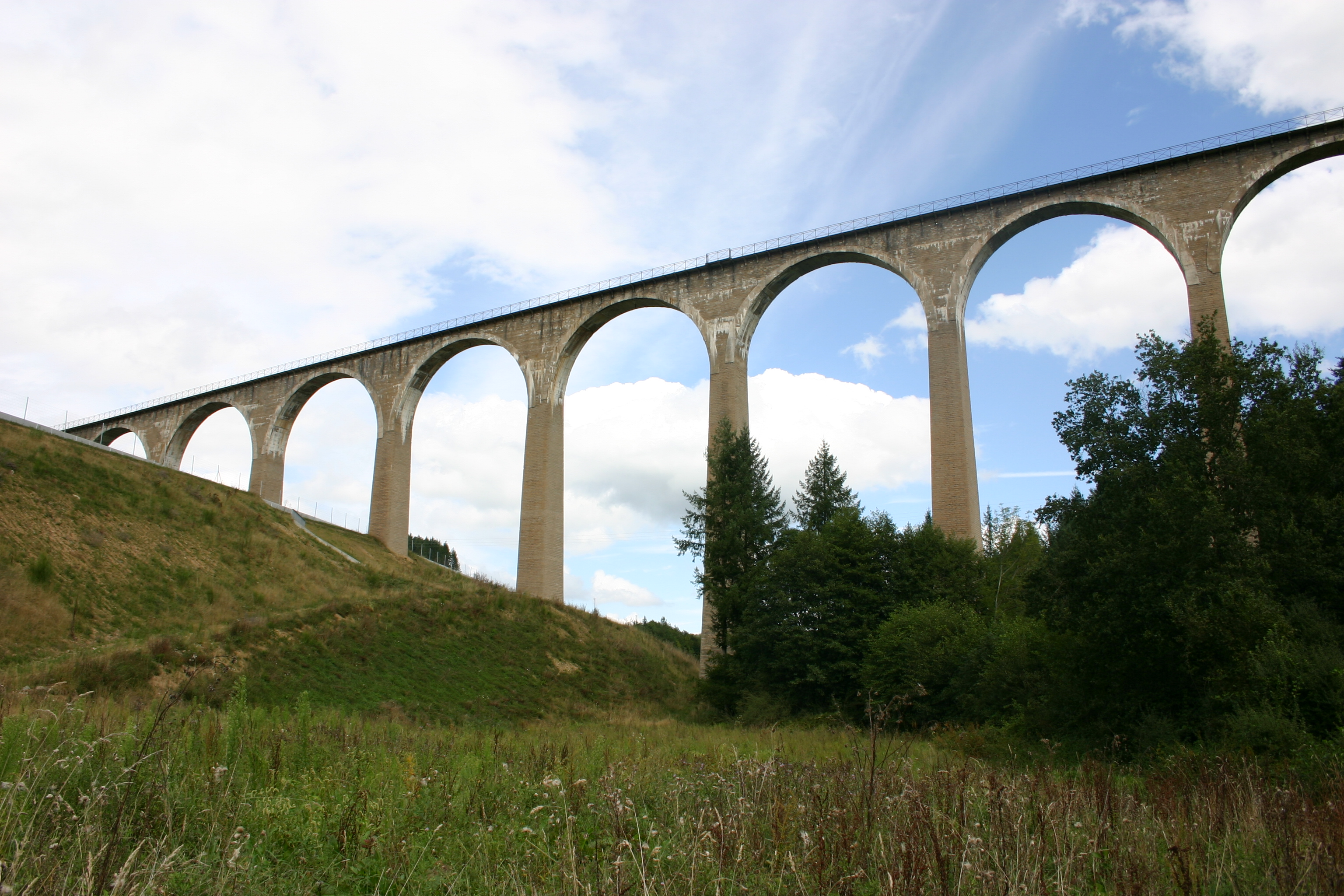 Le viaduc du Pont Marteau sur la commune de Bussières dans le département de la Loire.